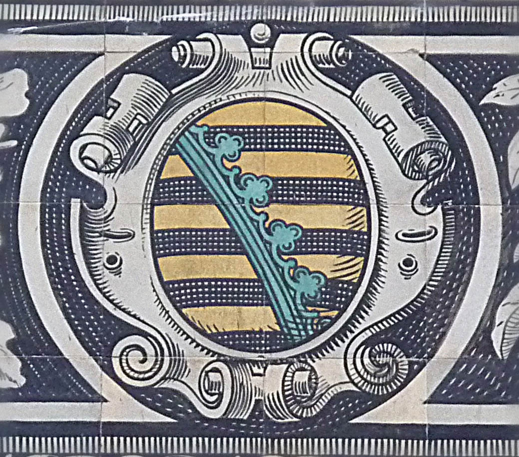 Fürstenzug in Dresden, Wappen des Herzogtums Sachsen